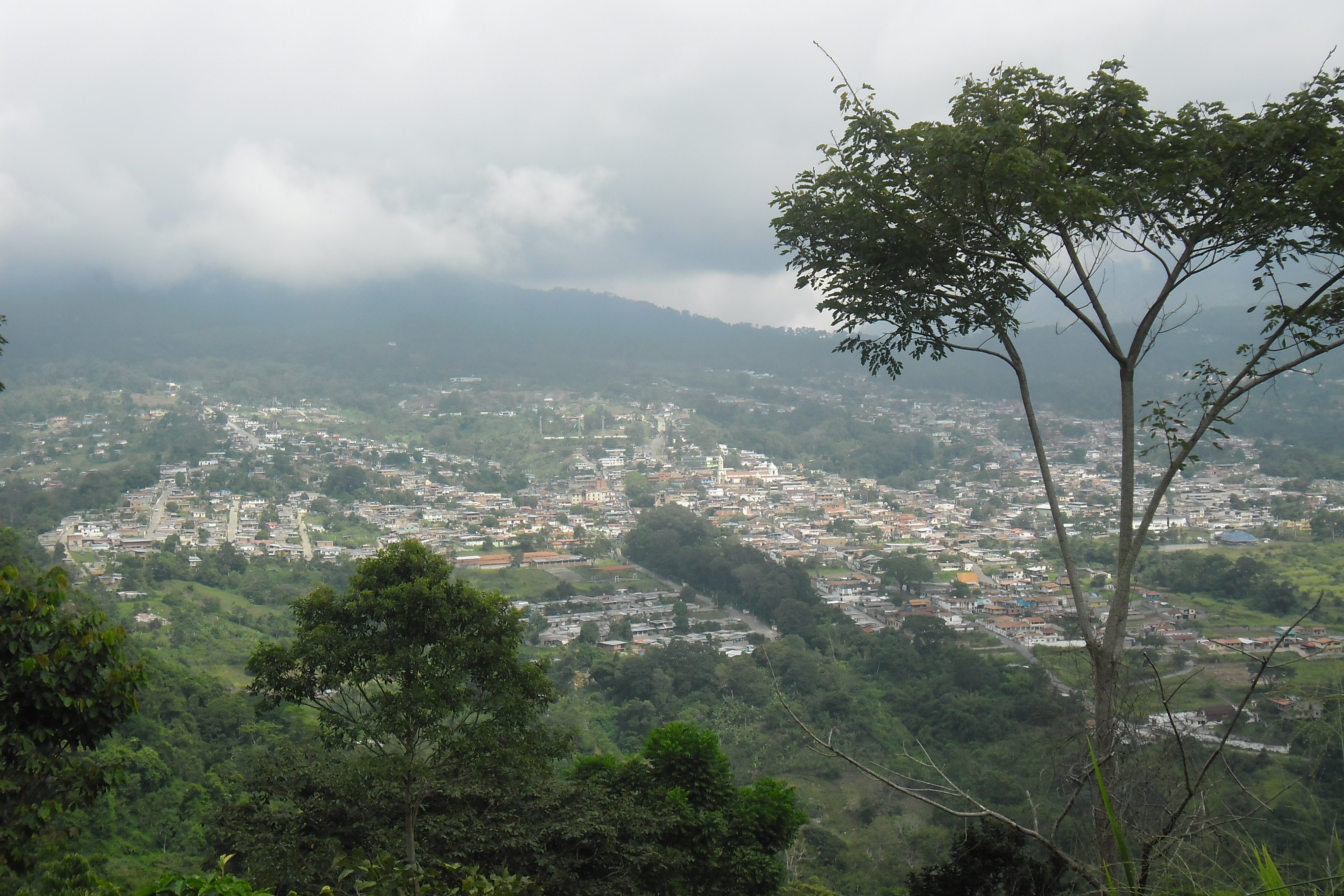 Vista de Escuque desde la Montaña "Castill de Reina"